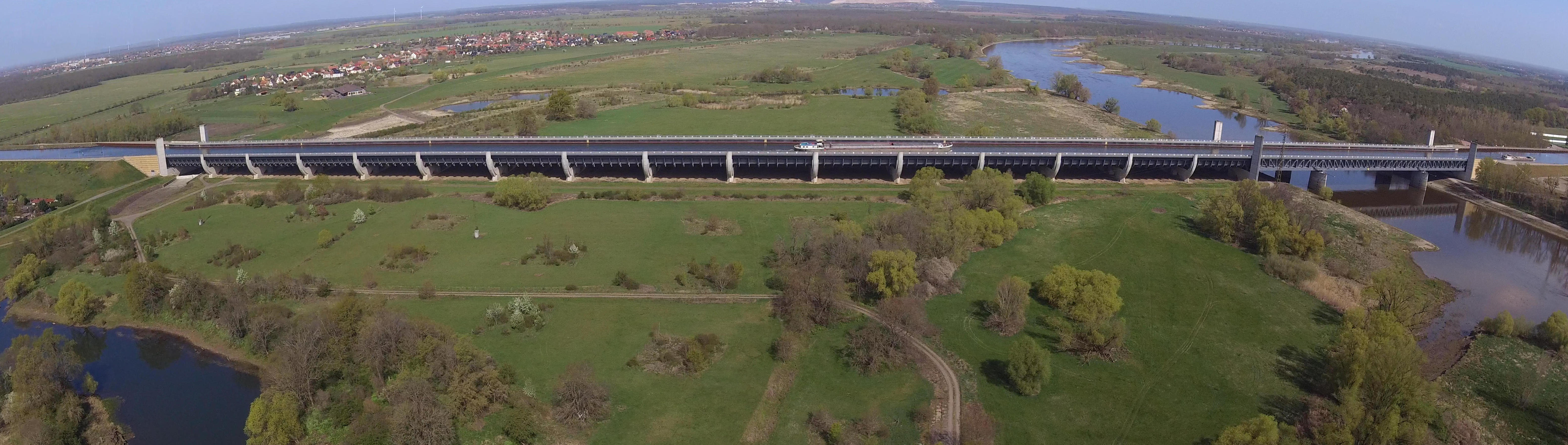 Kanalbrücke Magdeburg Luftbild